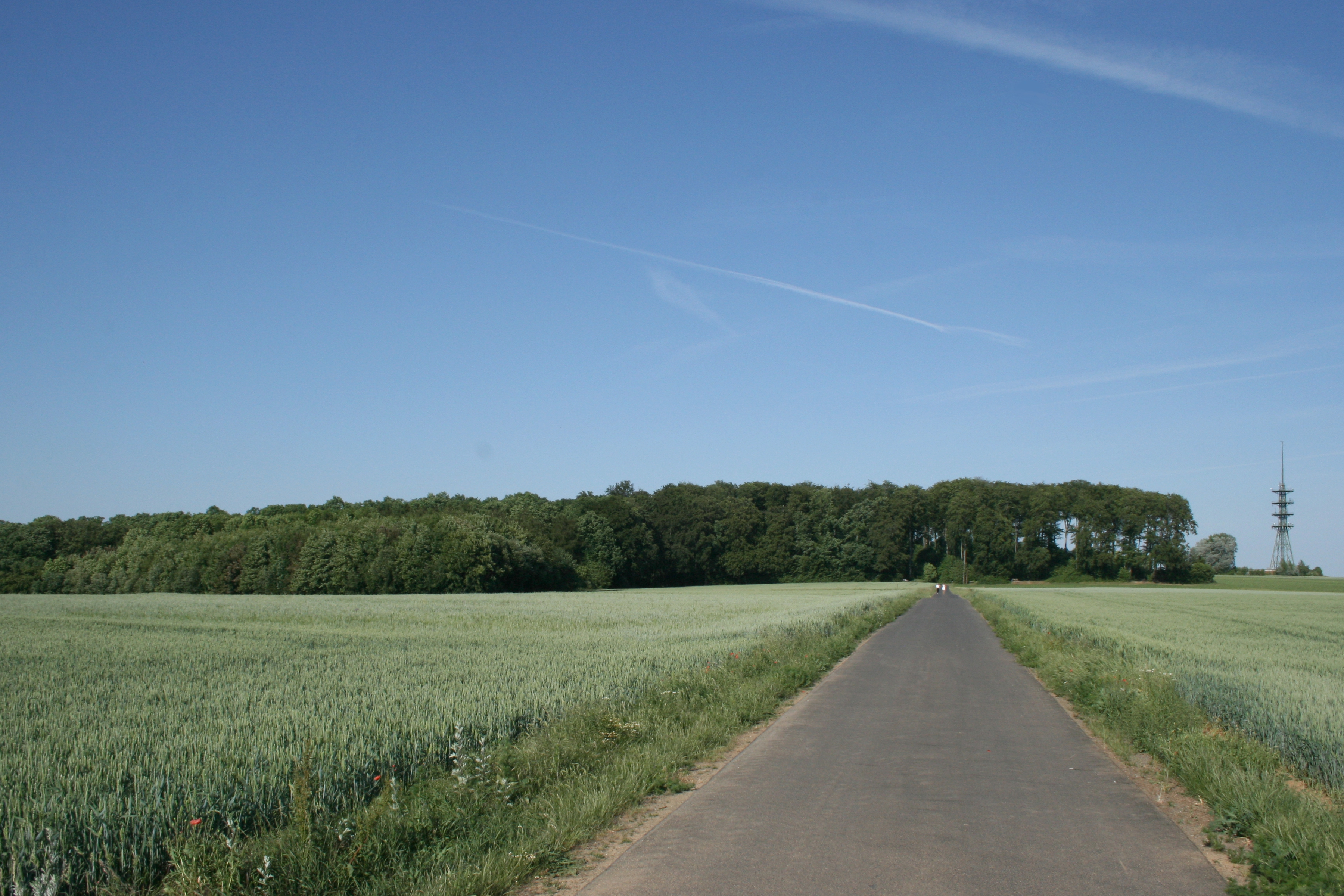 Hühnerberg zwischen Maintal und Niederdorfelden, Main-Kinzig-Kreis, Hessen. Blick von Westen mit der Kleinen Loh und dem Sendeturm.